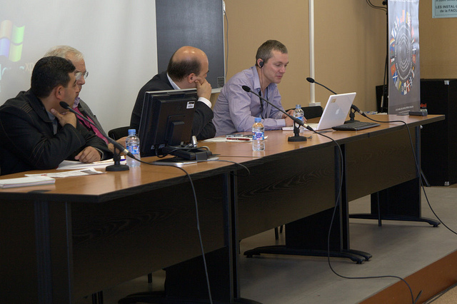 Mahmoud Saleh, Aureli Argemí, David Minoves i Sjurdur Skaale, a la taula 'Els drets col·lectius en el marc dels drets humans'